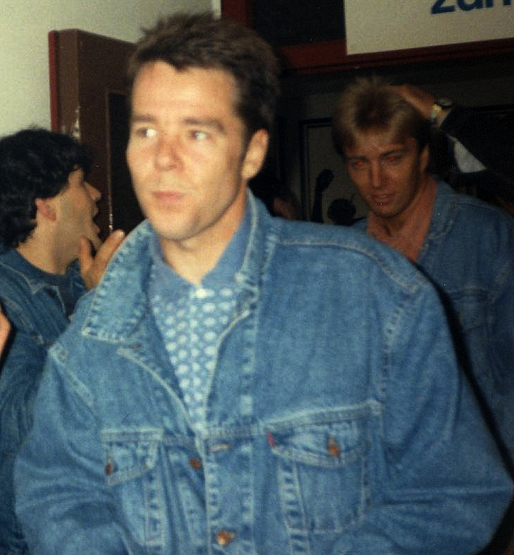 Jürgen Gronau